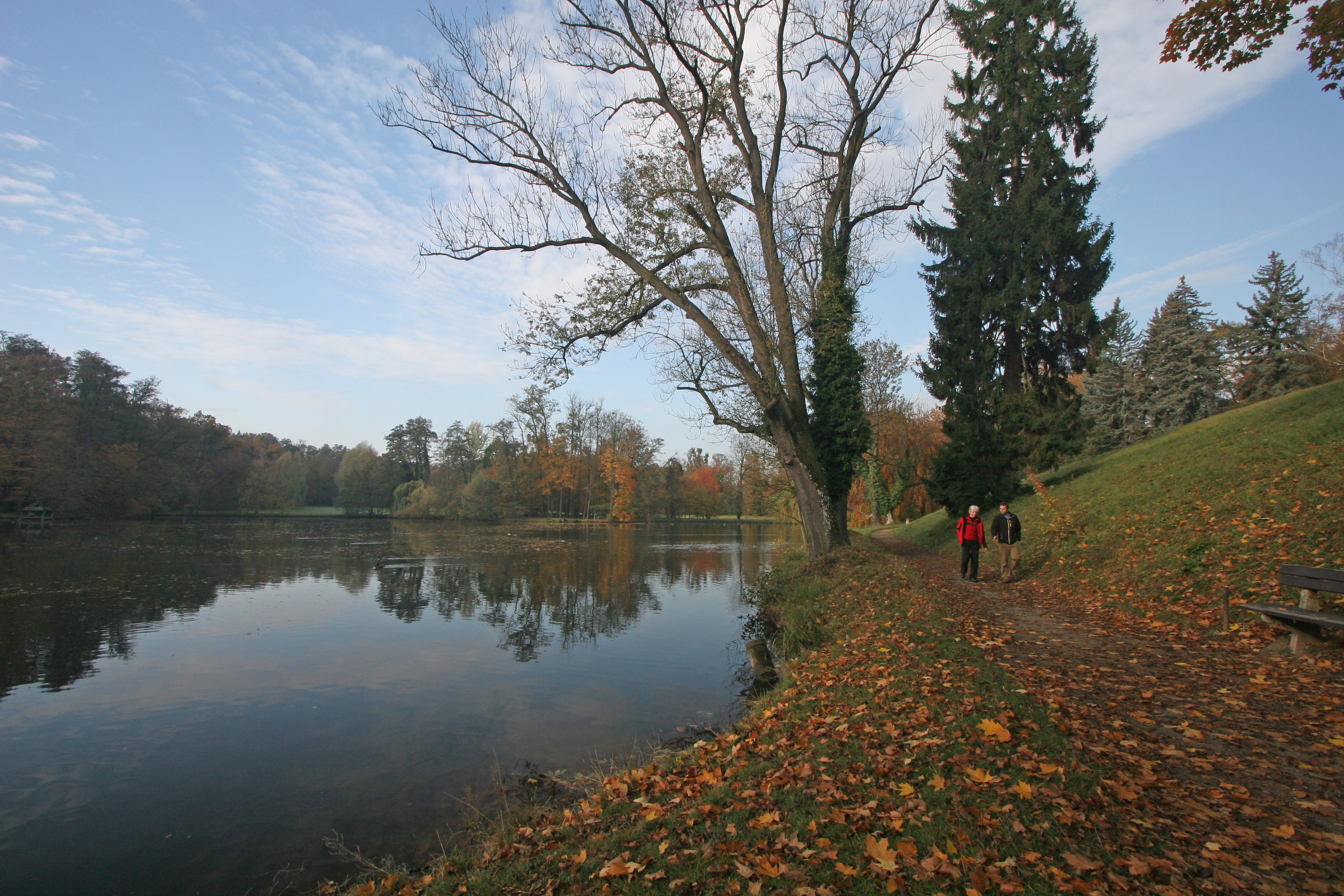 Zámecký park v Heřmanově Městci